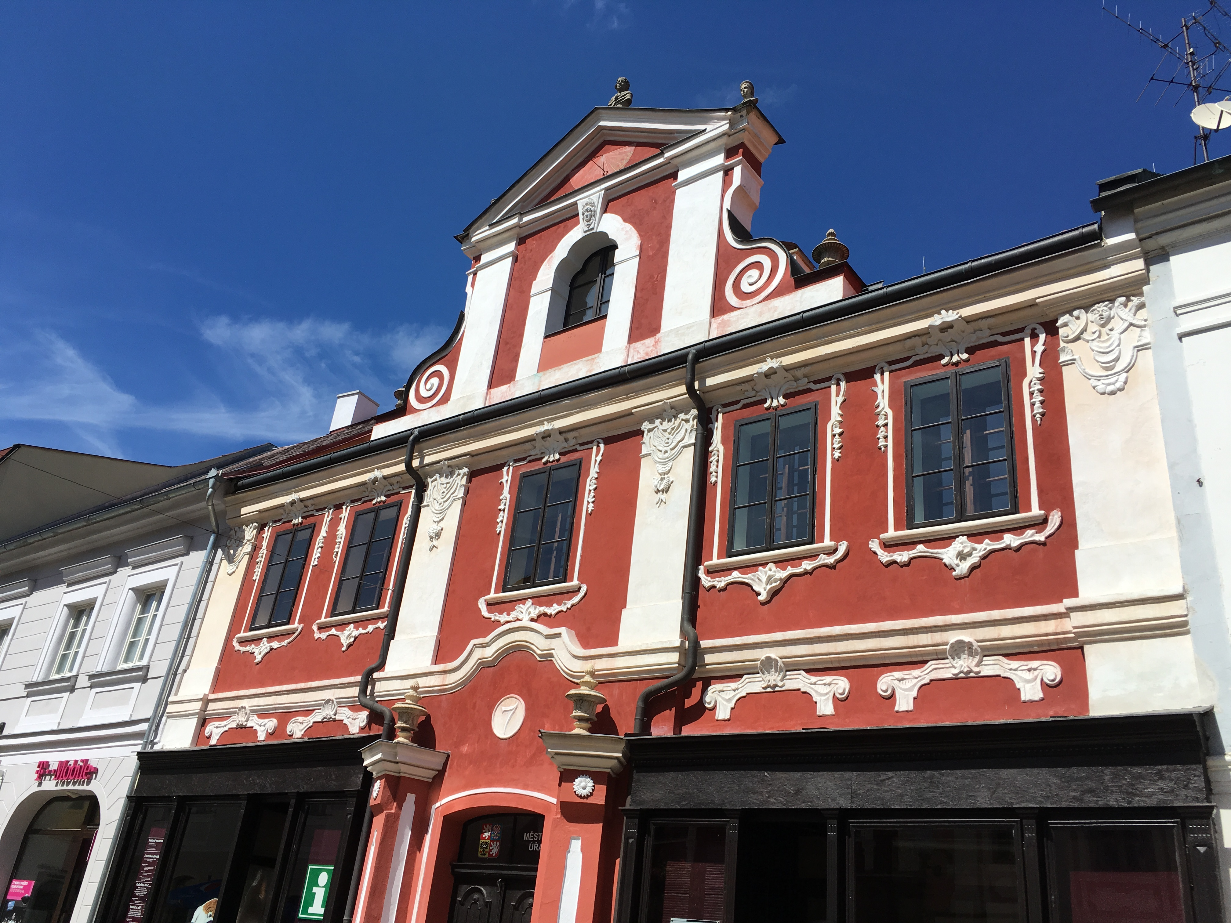 Egermannův dům